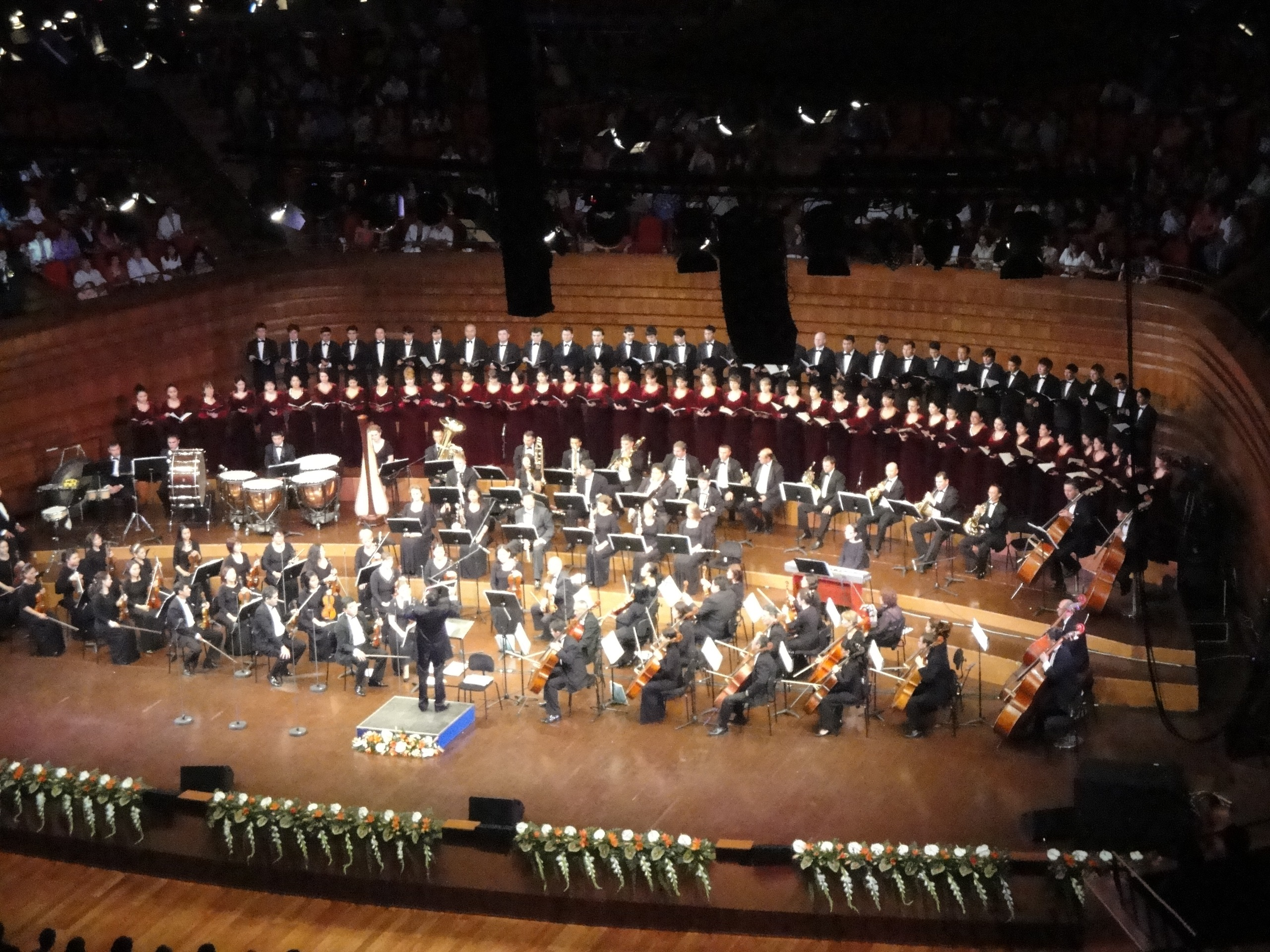 ЦКЗ Казахстан